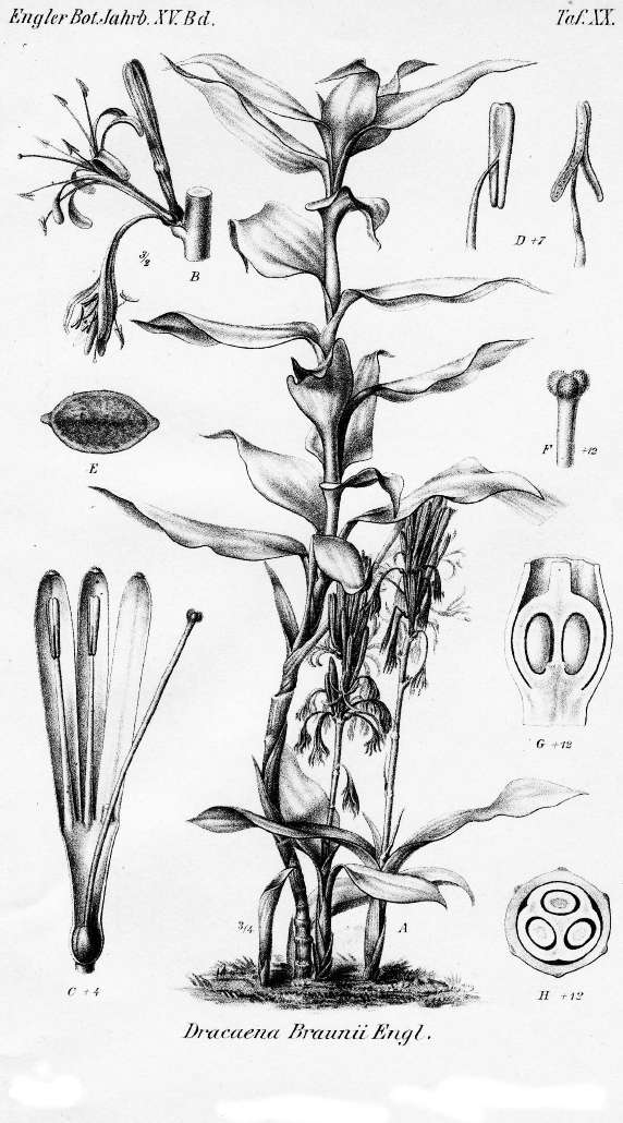 Dracaena braunii Engl., fleur ouverte, graine, inflorescence, port, étamine, stigmate, sections d'ovaire